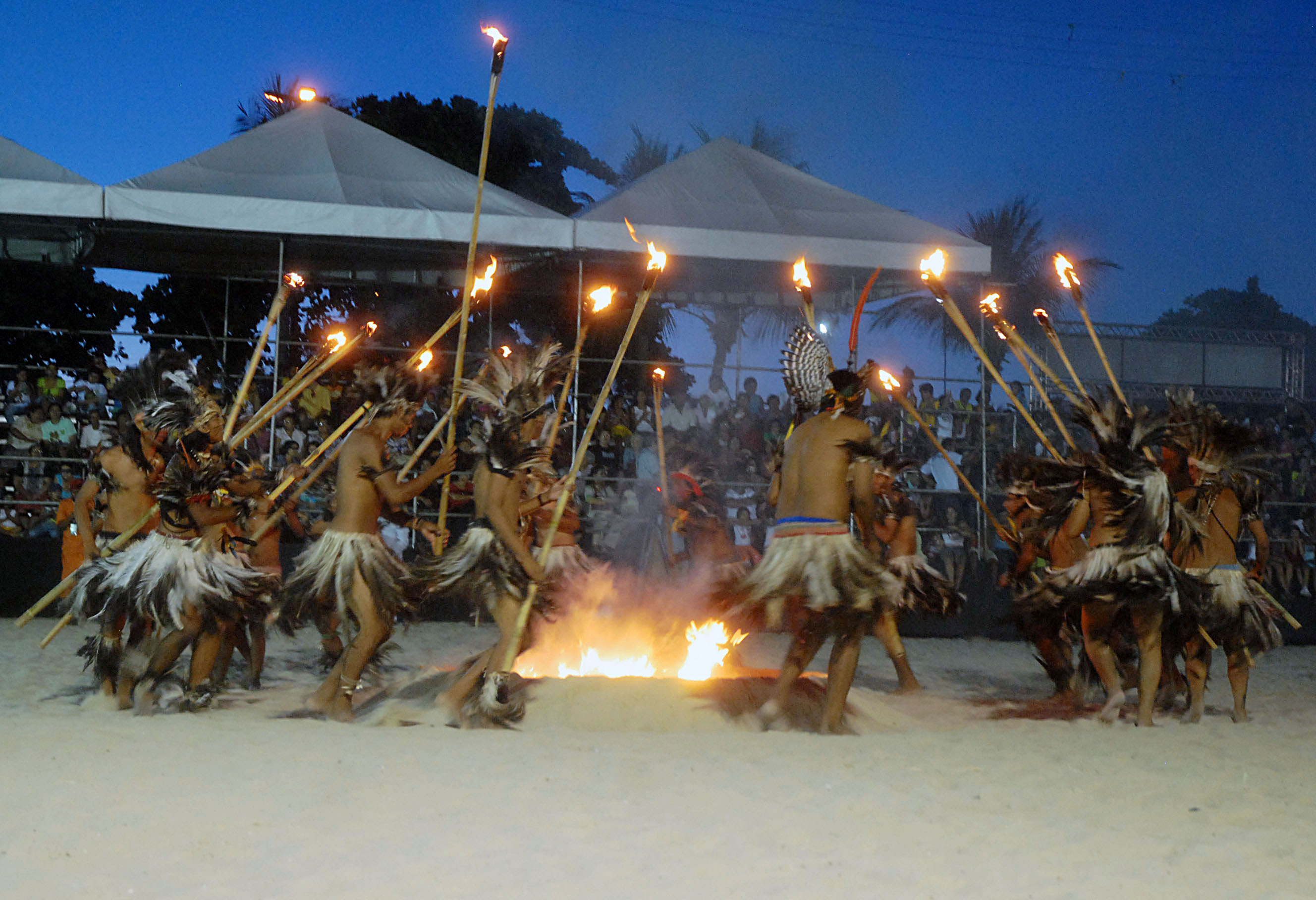 Índios da etnia Terena na cerimônia de encerramento da nona edição dos Jogos dos Povos Indígenas (Olinda PE)